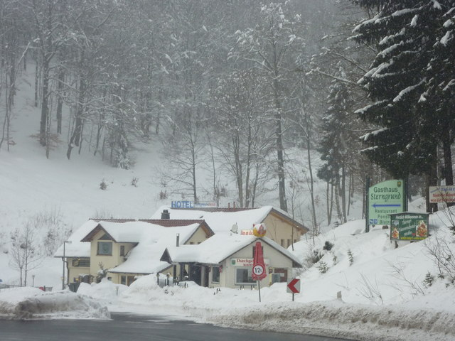 Oberhof. Gastst�tte Sterngrund auf der B247.